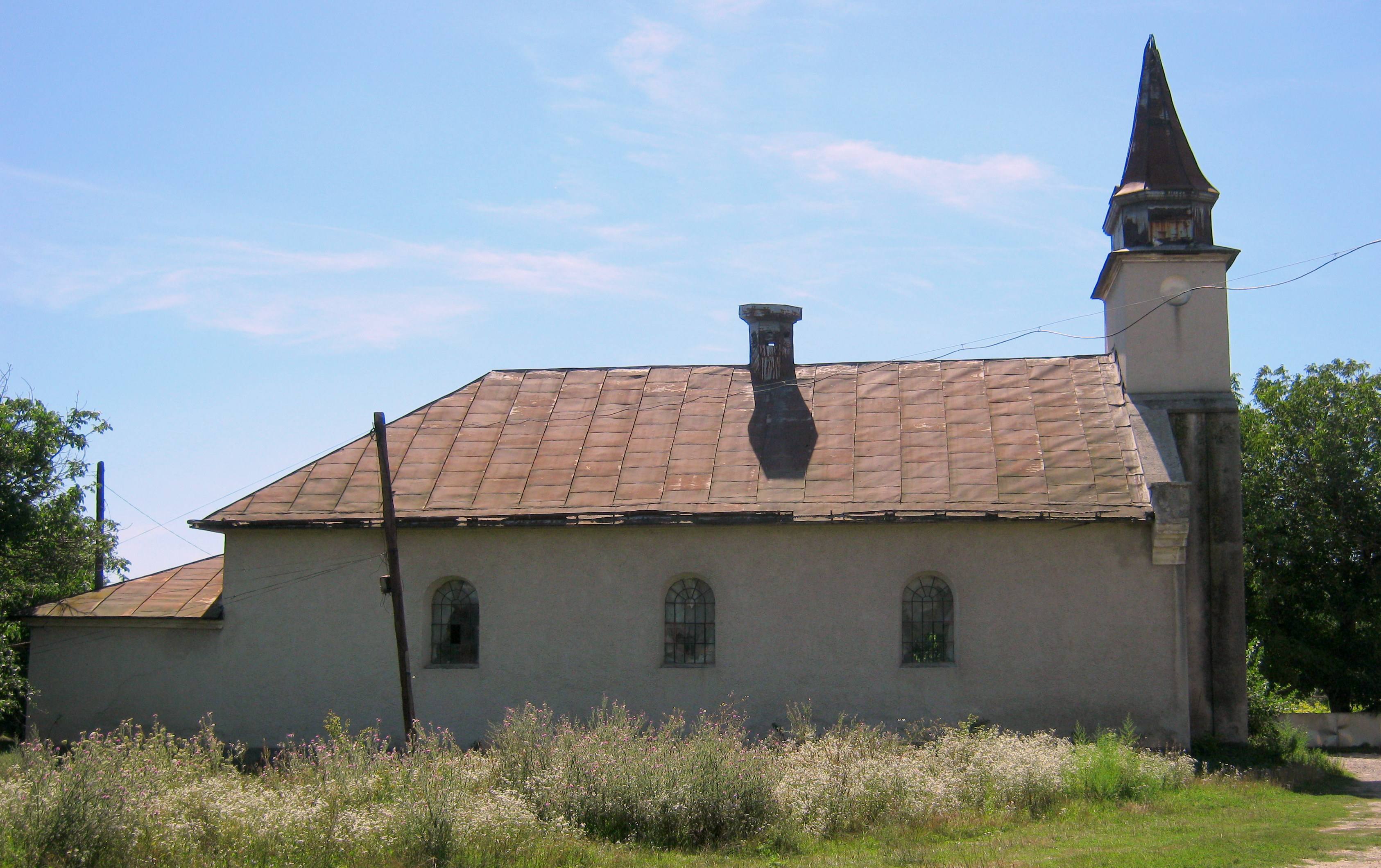 Приміщення колишнього костелу у селі Устя Борщівського району Тернопільської області